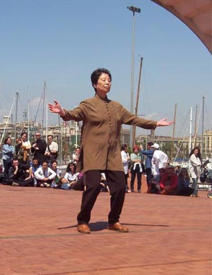 Chi Kung (Qigong) Dra. Hu Yuen Xian en la Maratón de Barcelona mostrando el Chi Kung de la calma y el movimiento. Fotografía realizada por Manuel Joseph (27/4/2003)